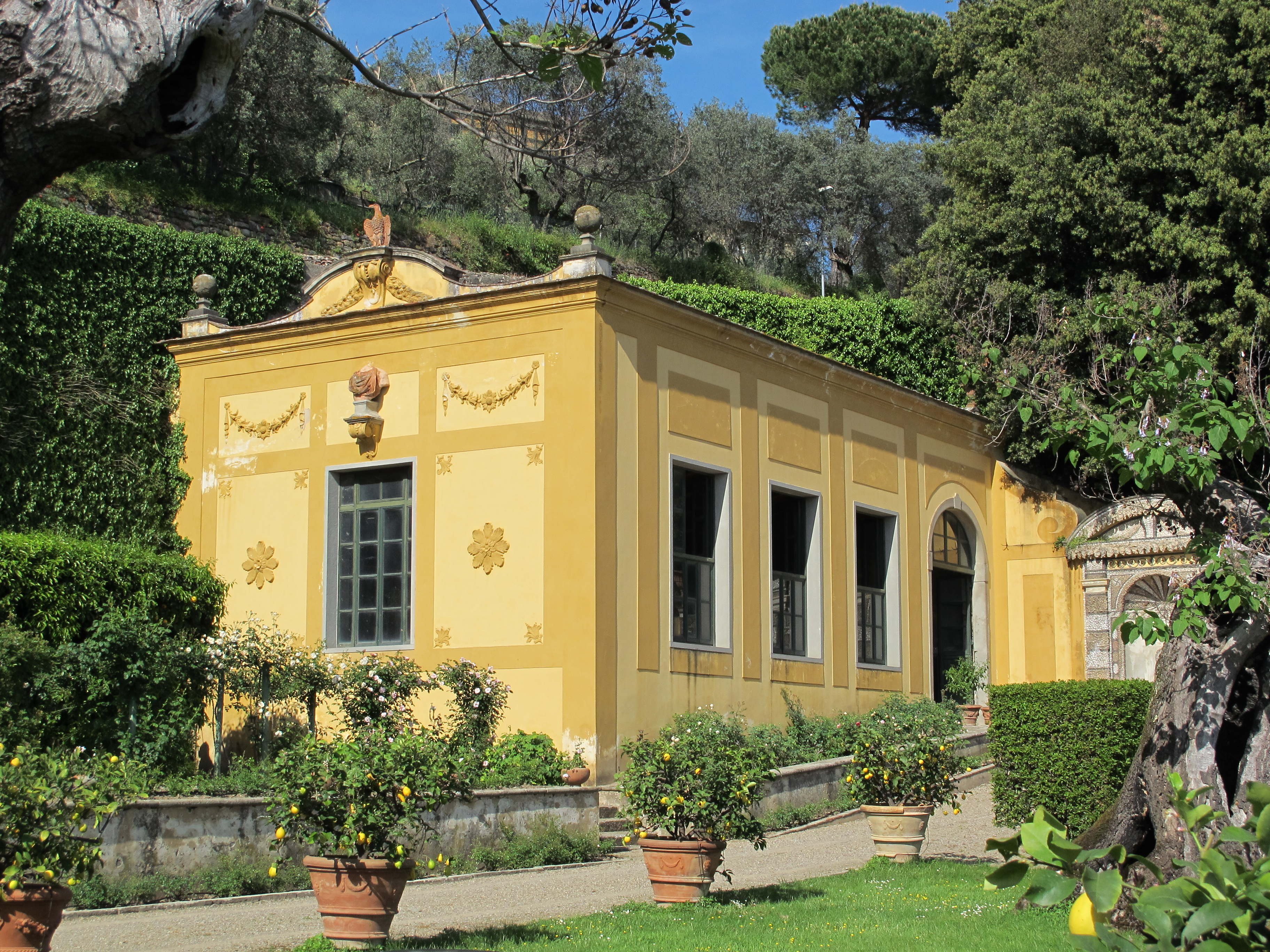 Villa medici di belcanto, limonaia